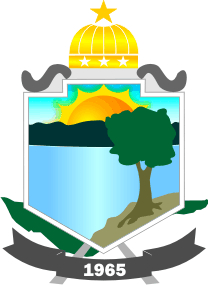 Brasão de Coari-Amazonas